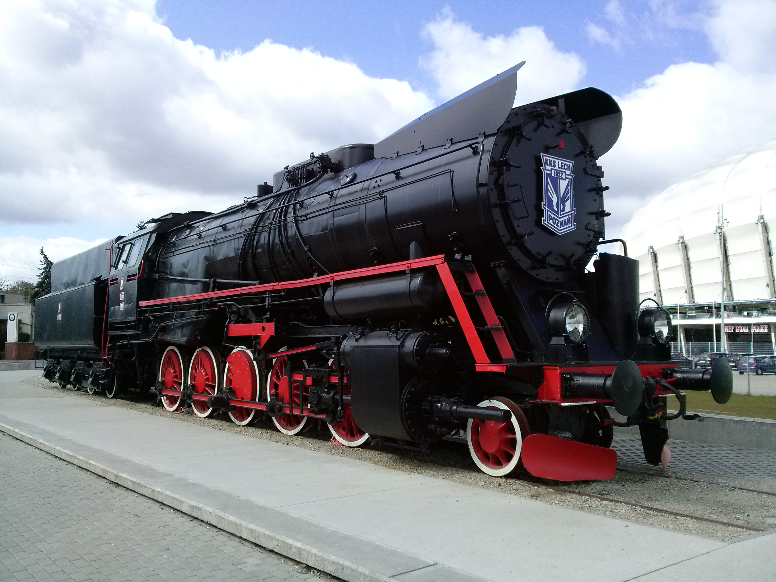 Parowóz Ty51 przy stadionie INEA na ulicy Bułgarskiej w Poznaniu.